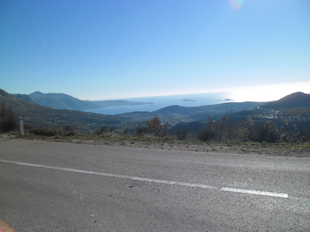 pogled s Ivanice